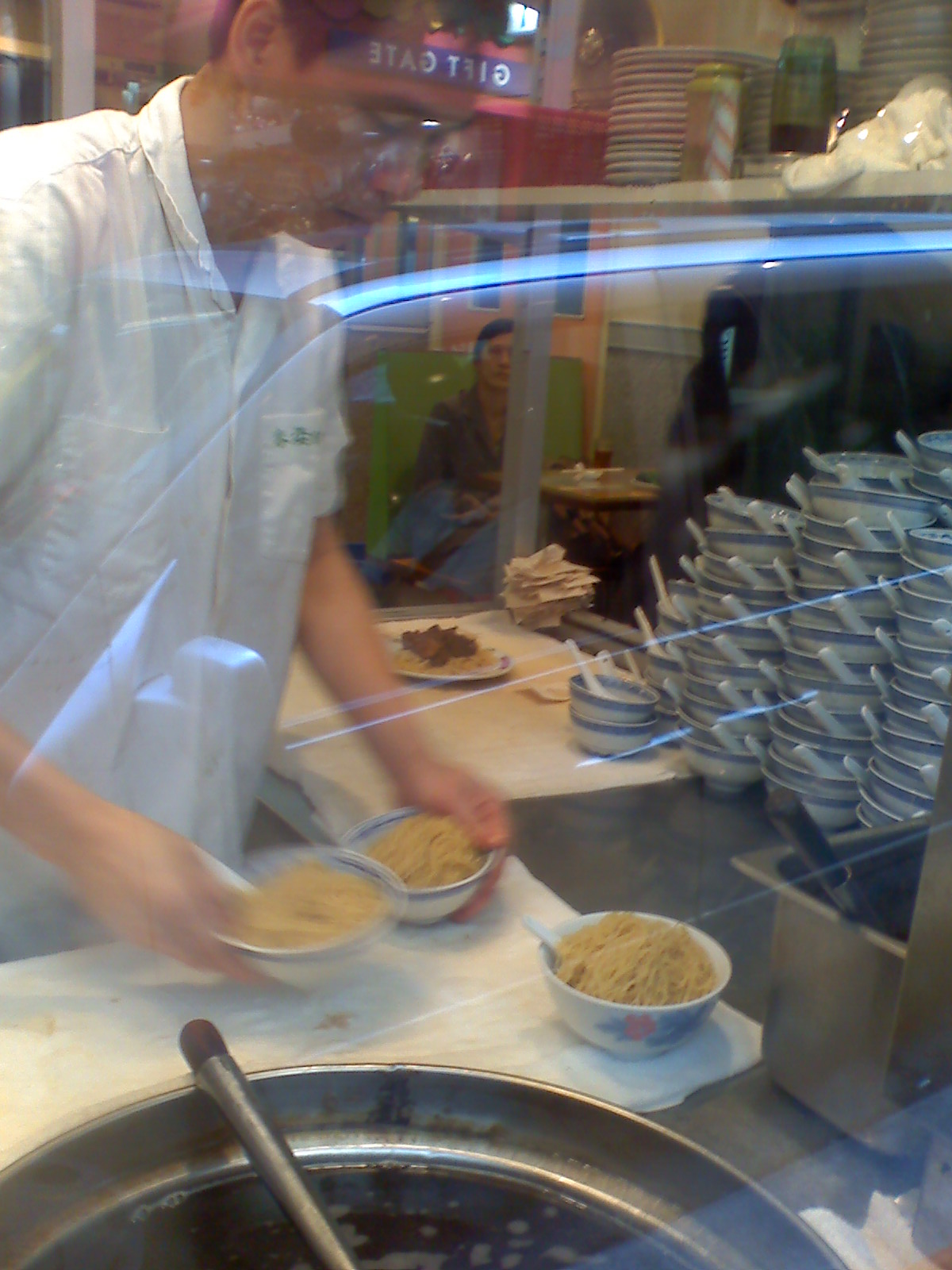 Mak's Noodles